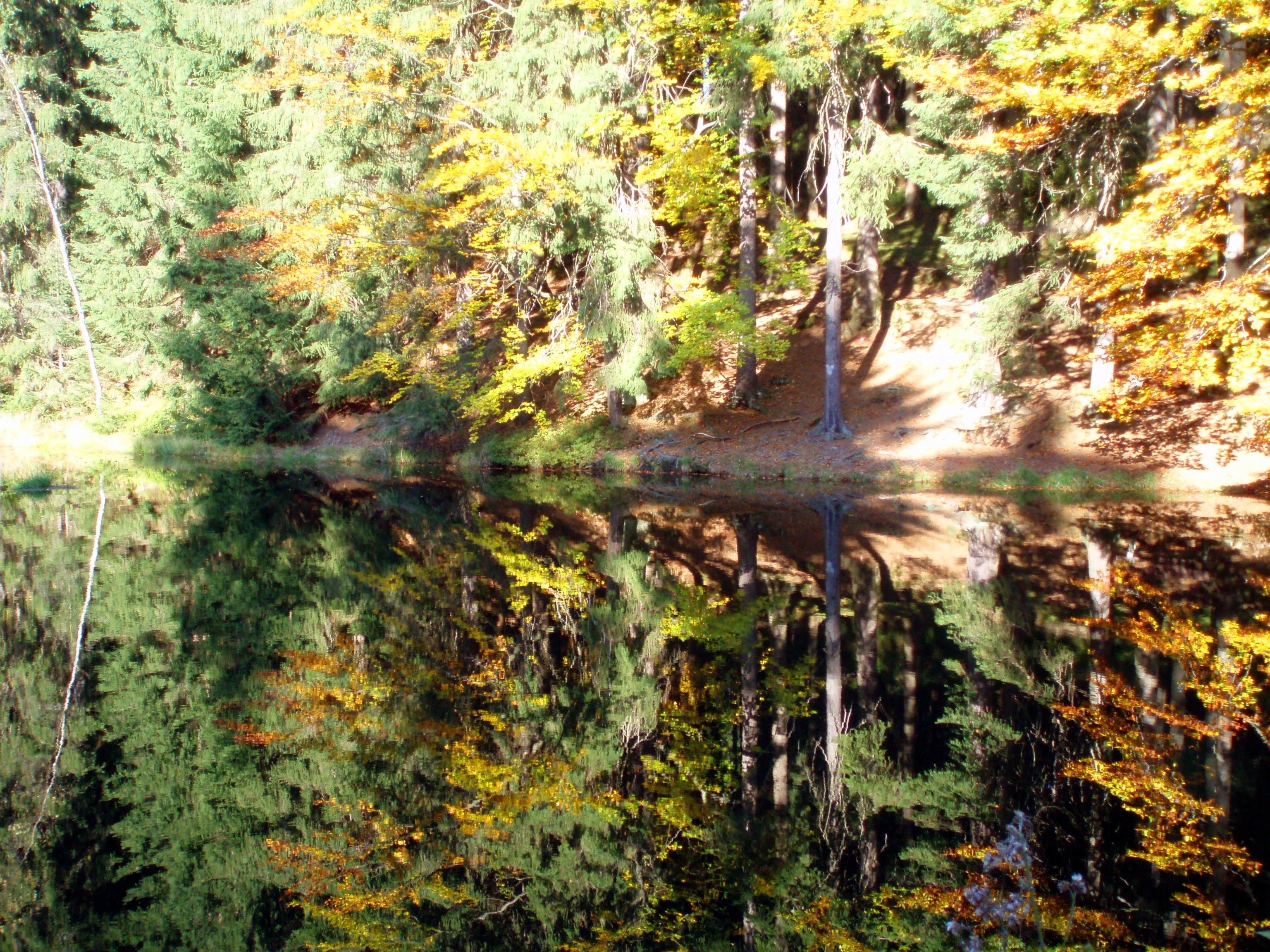 Herbst am Unteren Floßteich bei Klingenthal